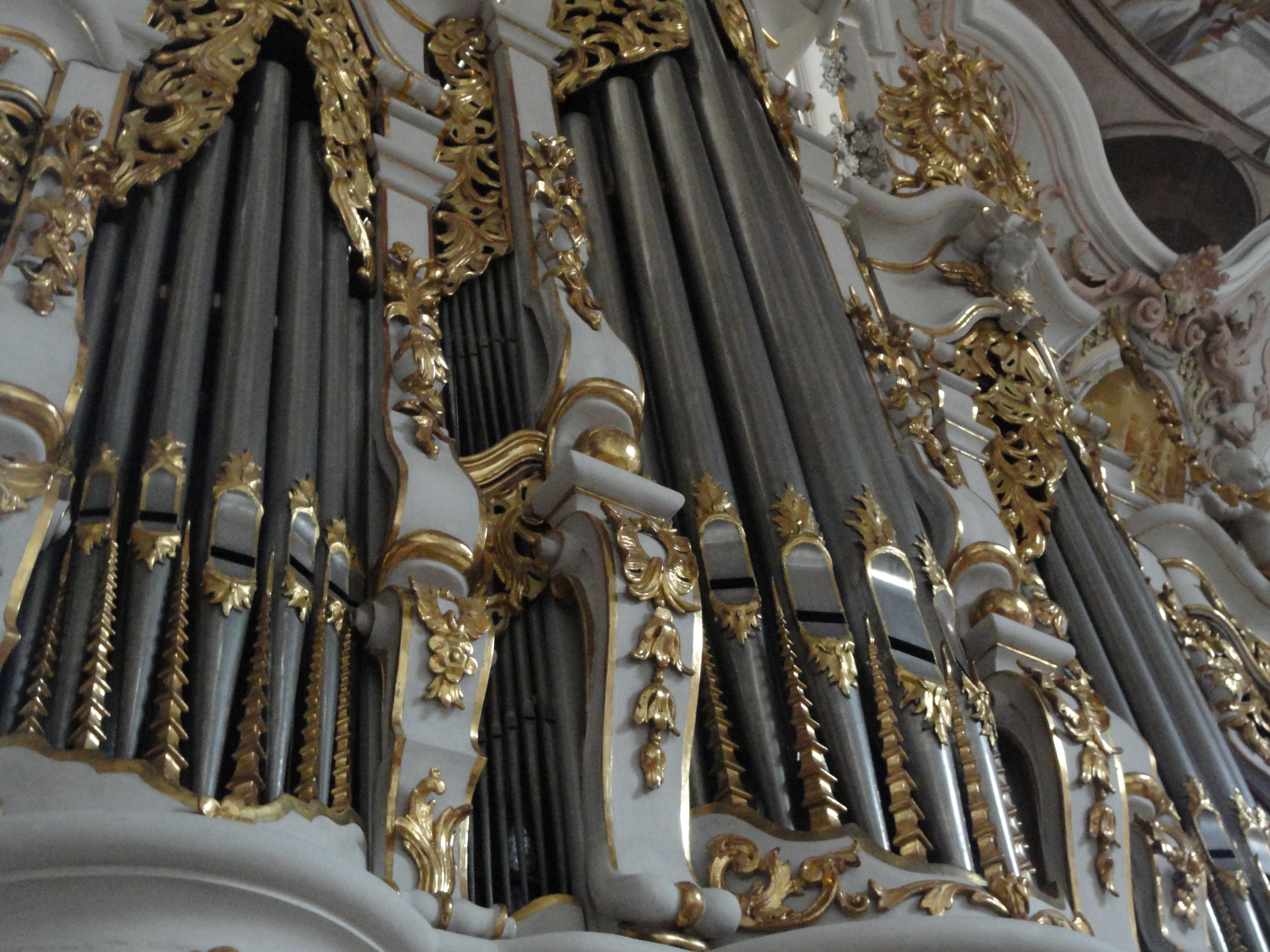 Metzler-Orgel Neustift Prospekt Ausschnitt